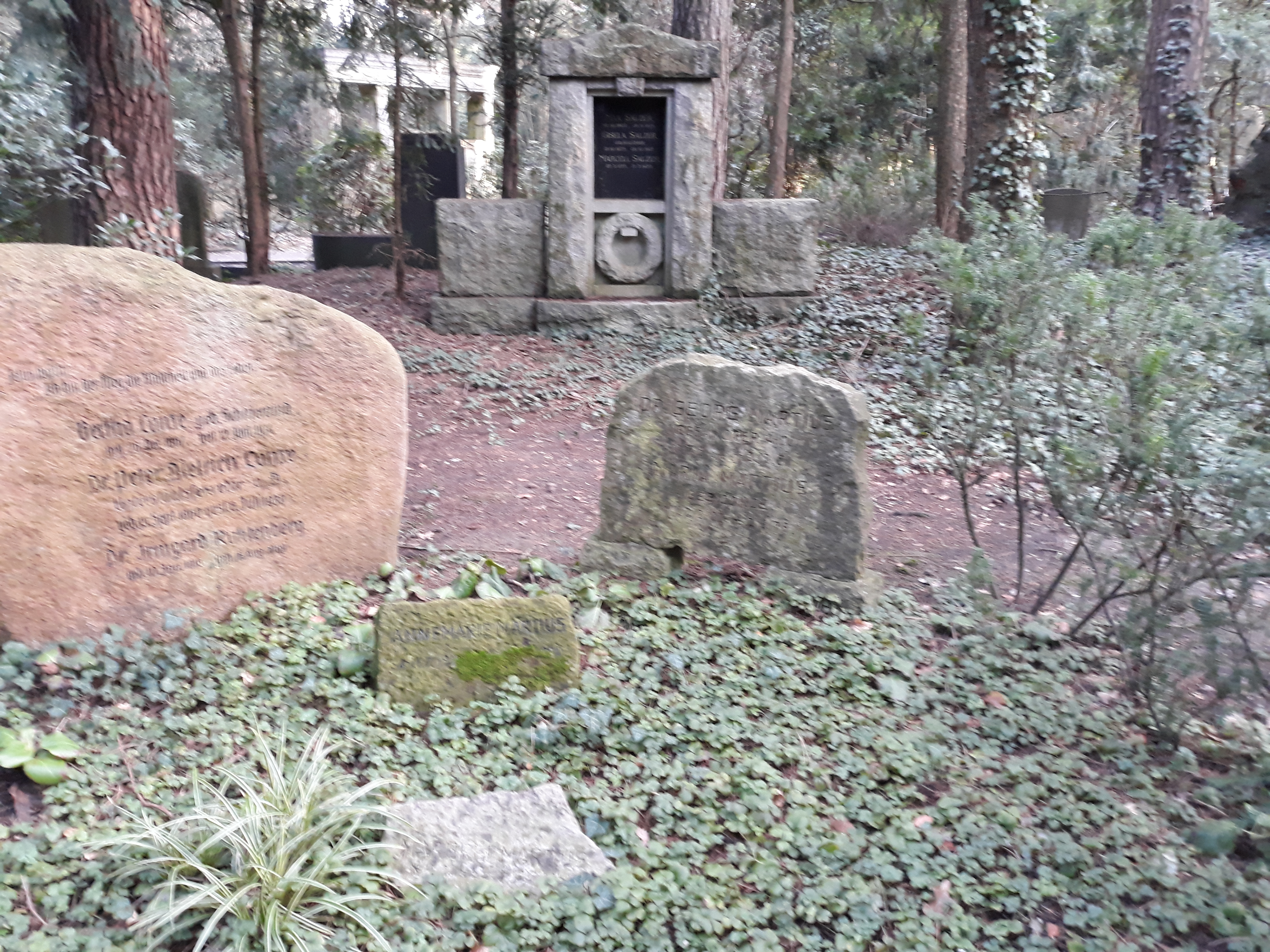 Das Grab des deutschen Diplomaten Georg Martius im Familiengrab auf dem Parkfriedhof Lichterfelde in Berlin.